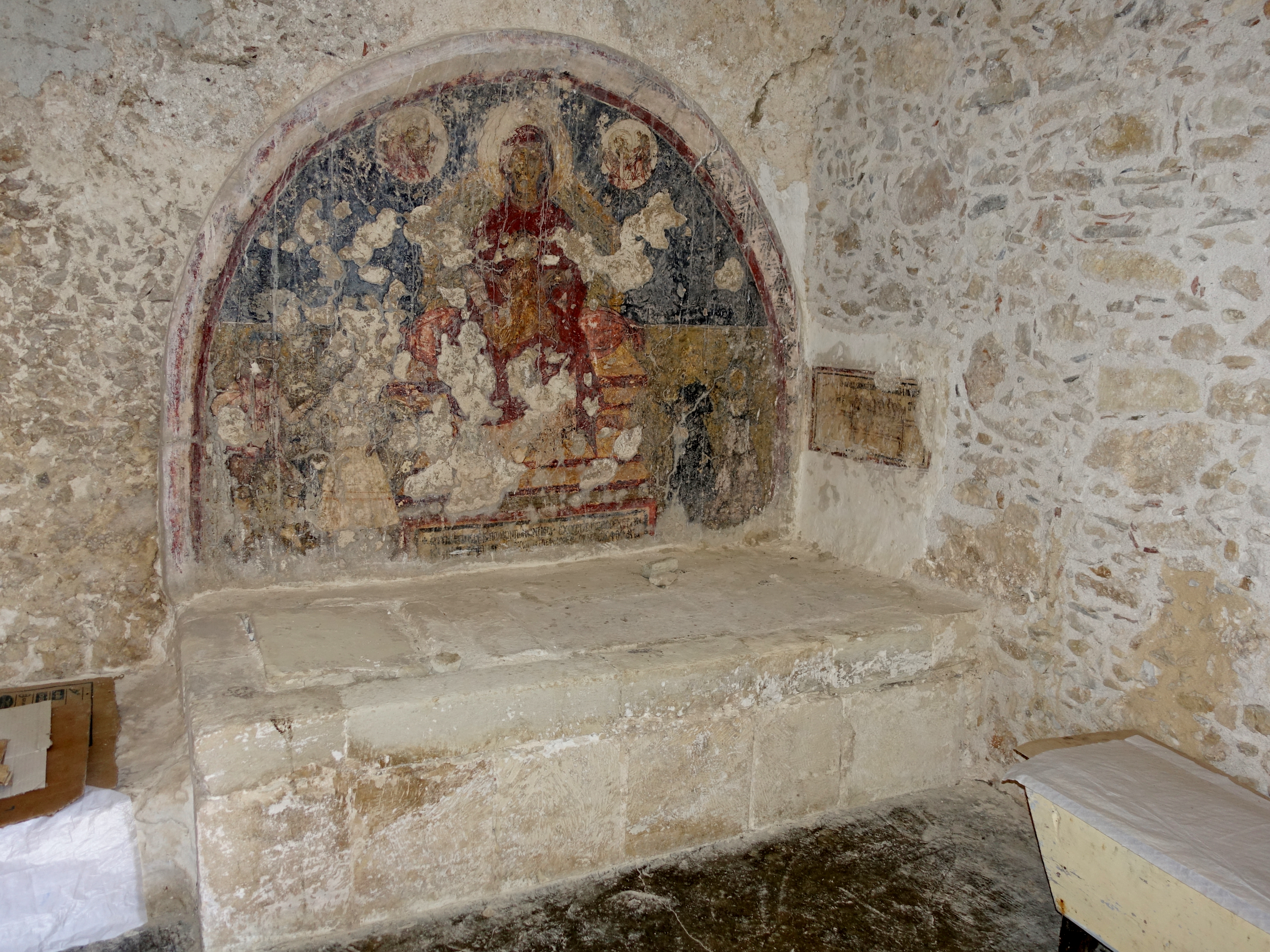 Kirche Agios Georgios (Άγιος Γεώργιος) bei den Ruinen von Voila (Βόϊλα), Gemeinde Sitia, Kreta, Griechenland